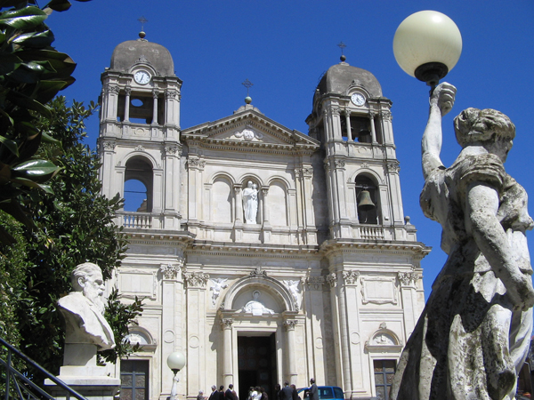 Chiesa Madre di Zafferana Etnea (CT) - Foto D. Pennisi